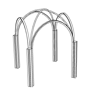 קמרון צולב